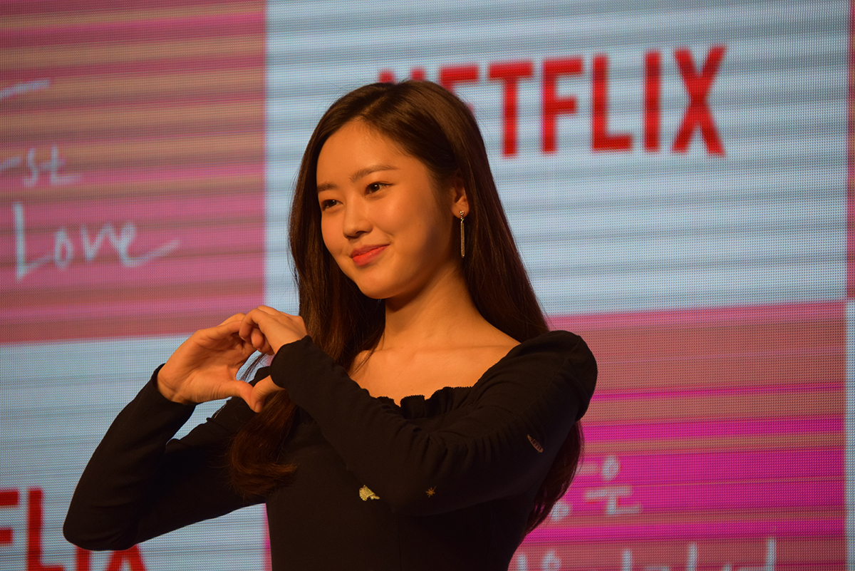 최리 넷플릭스오리지널 '첫사랑은 처음이라서' (My First First Love) 제작발표회 (2019.4.12)